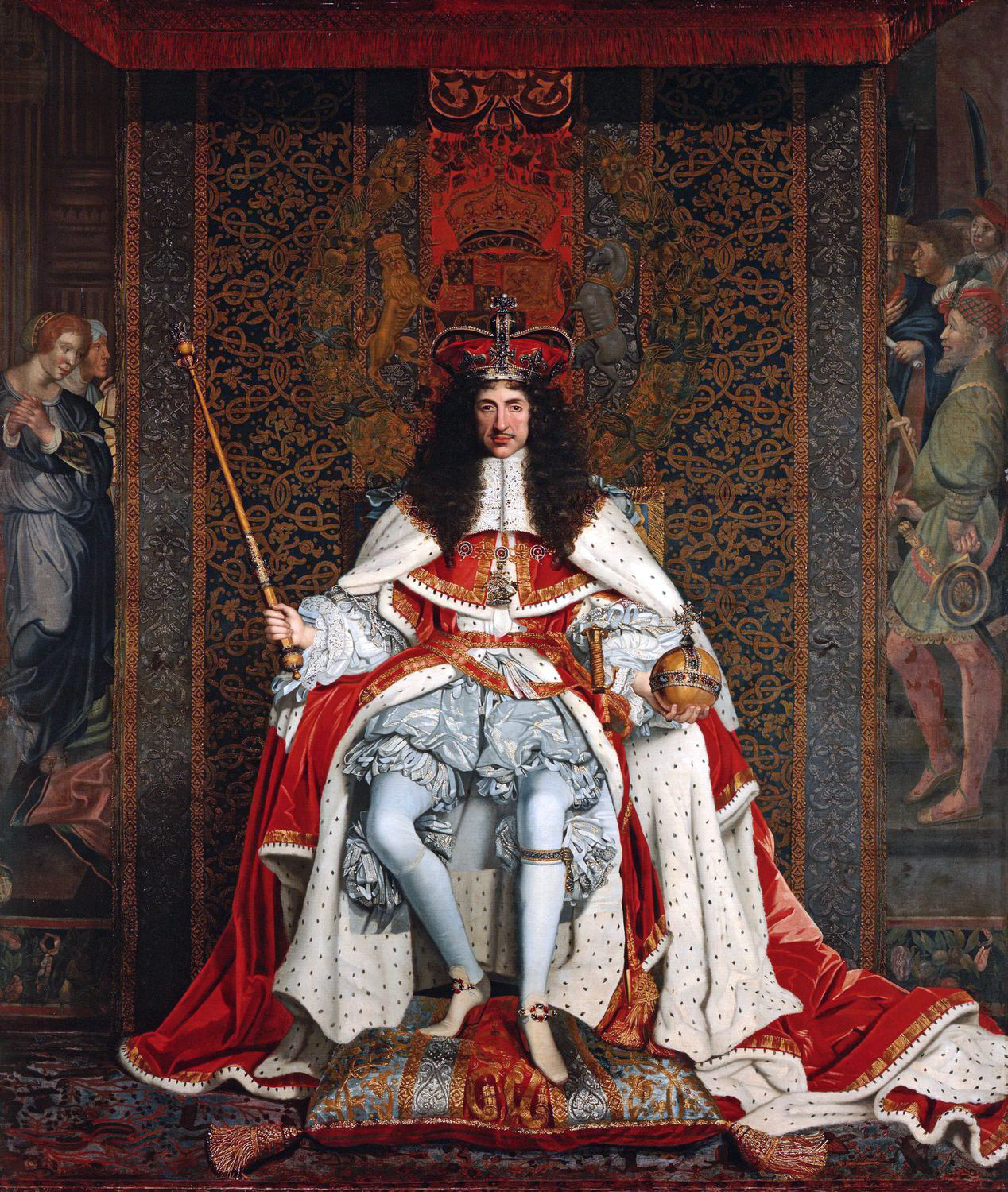 See [1].